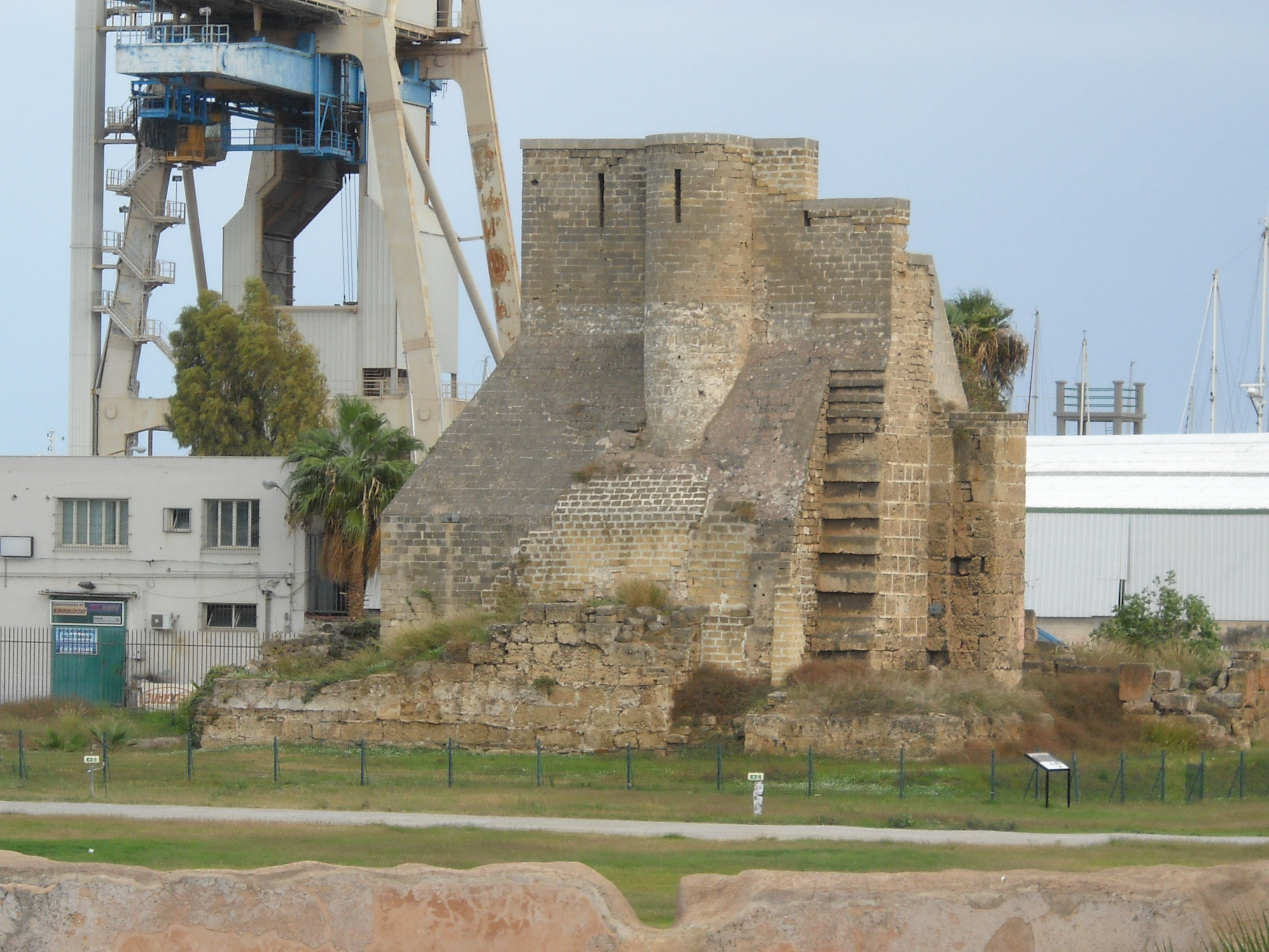 Castello a mare di Palermo il Mastio al di là della piazza d'armi